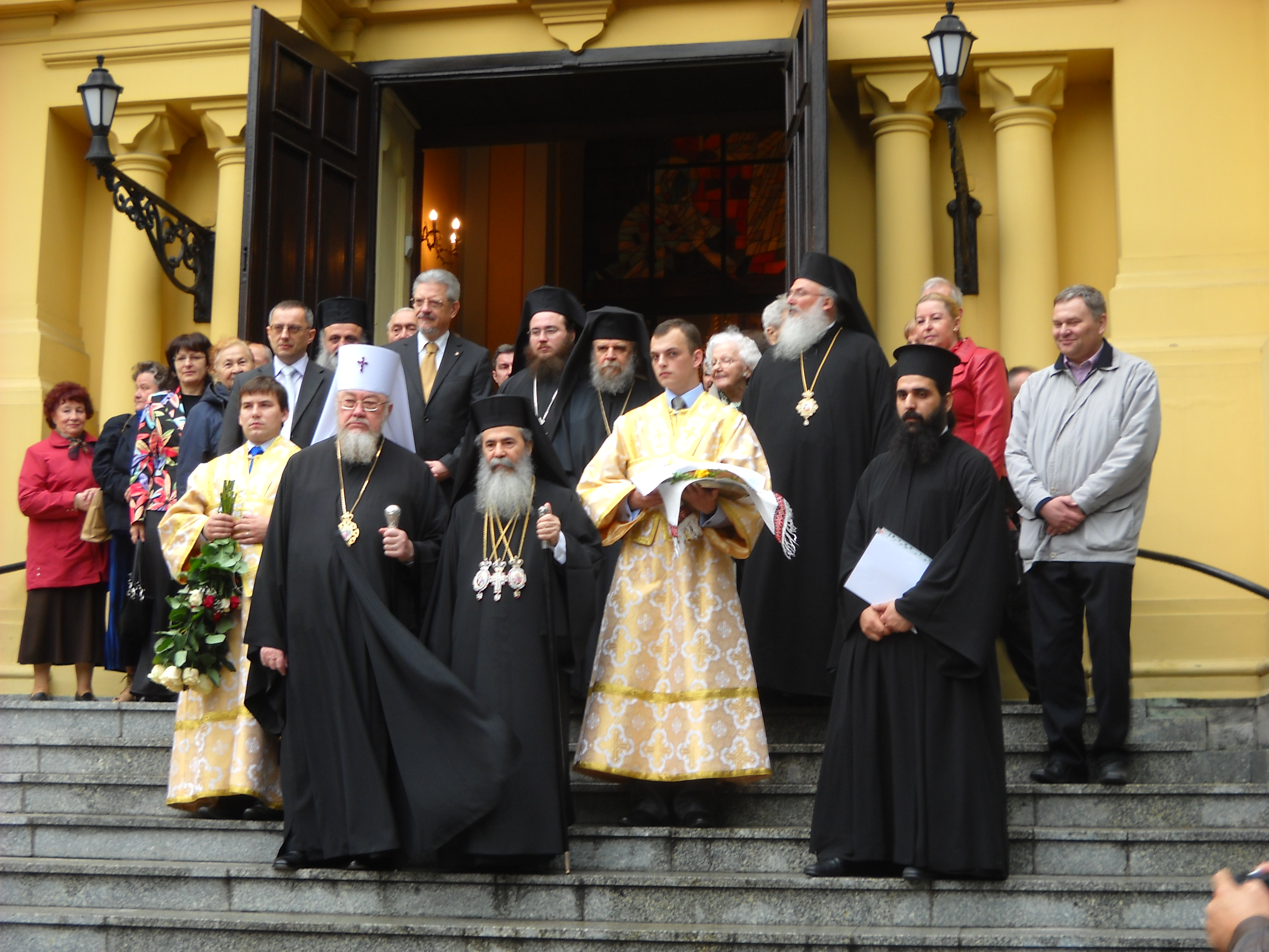 Patriarcha jerozolimski Teofil w Warszawie, czerwiec 2010